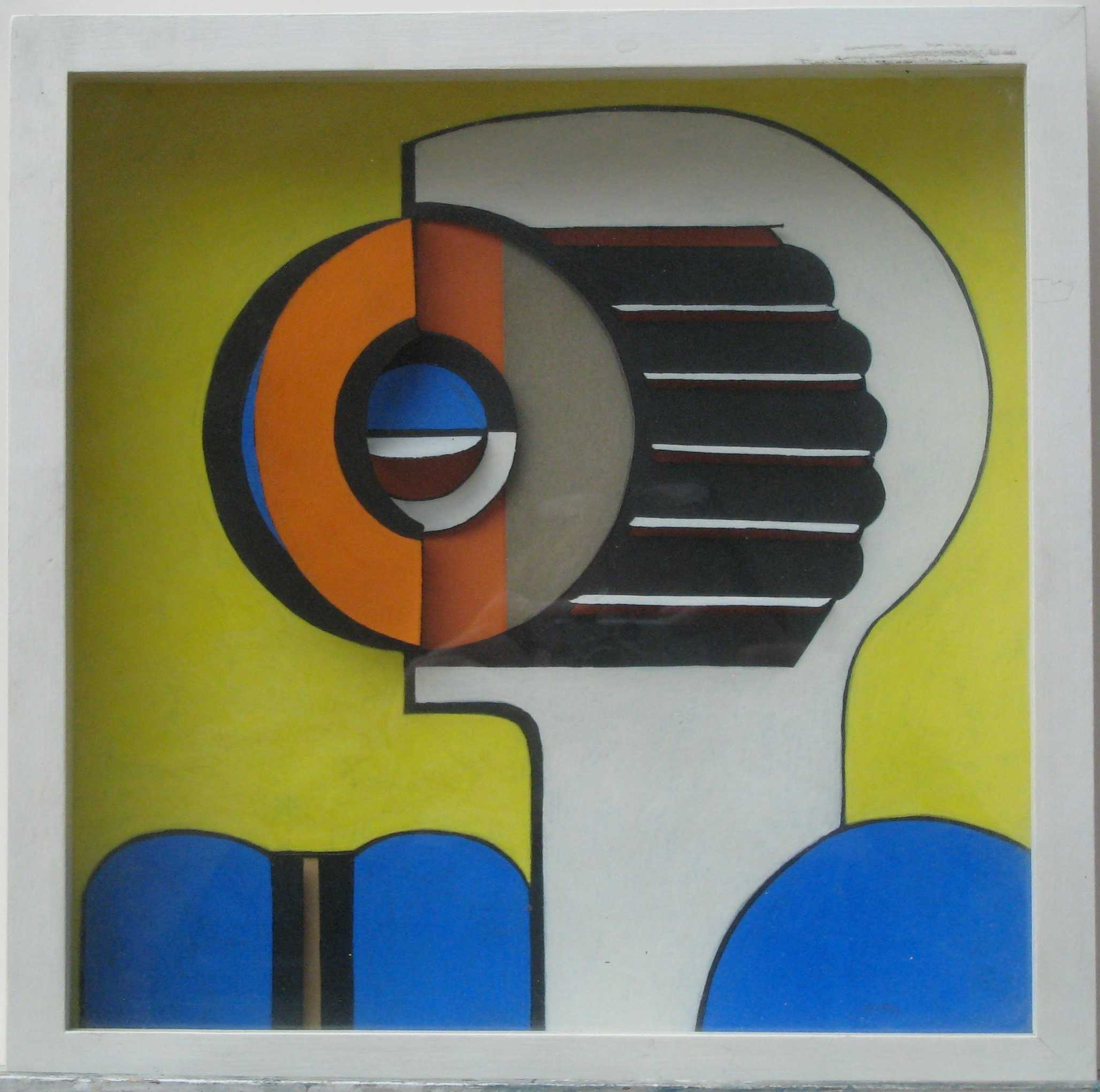 Raumschnitt von Ursula Stock, Collage, Höhe x Breite: 30 x 30 cm, 1971.